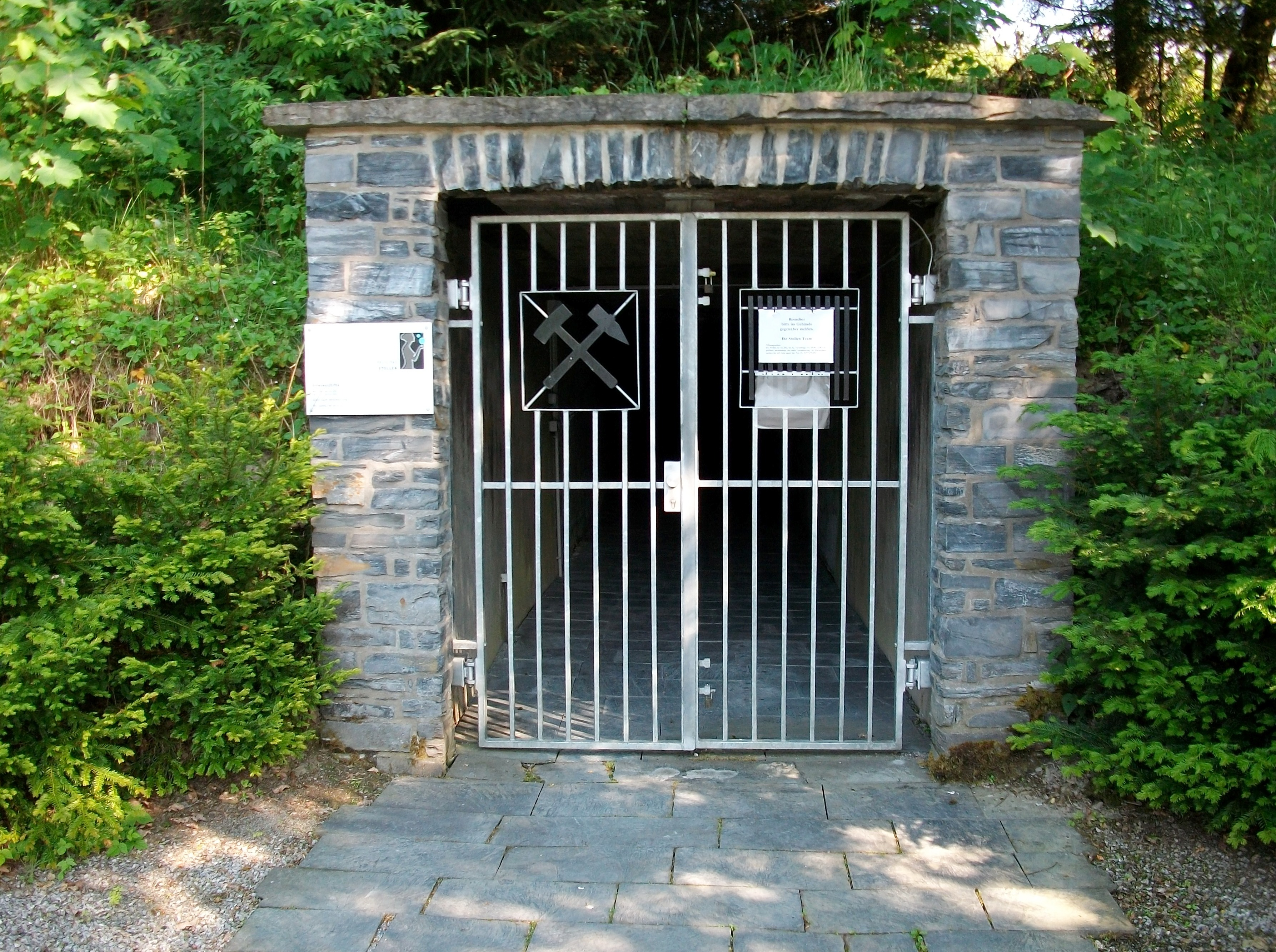 Schmallenberg, Abela-Heilstollen, früher Felicitas Stollen (Germany)